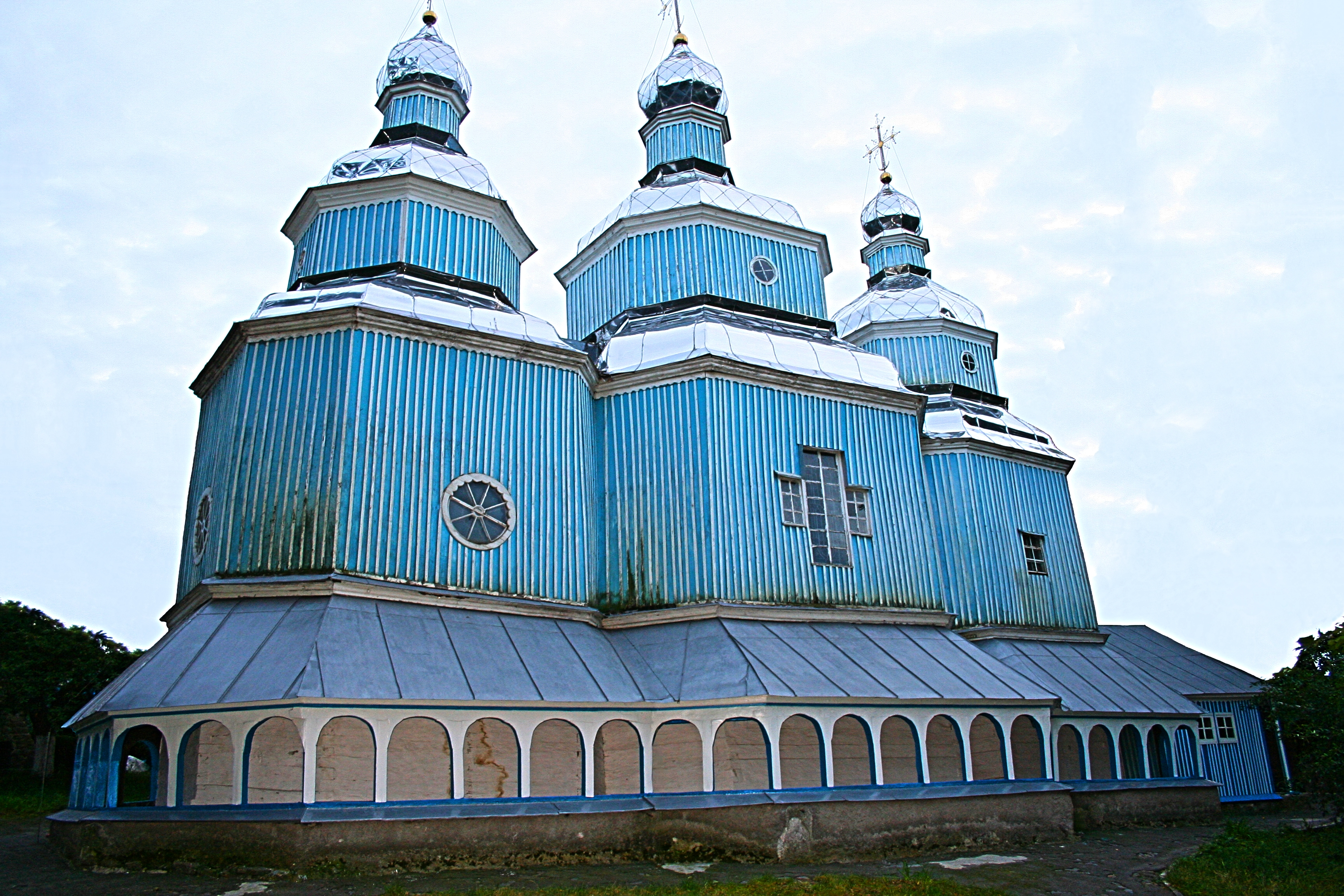 Українська церква